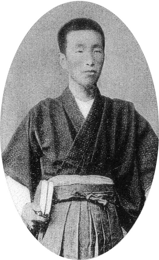 相馬半治 1891年頃